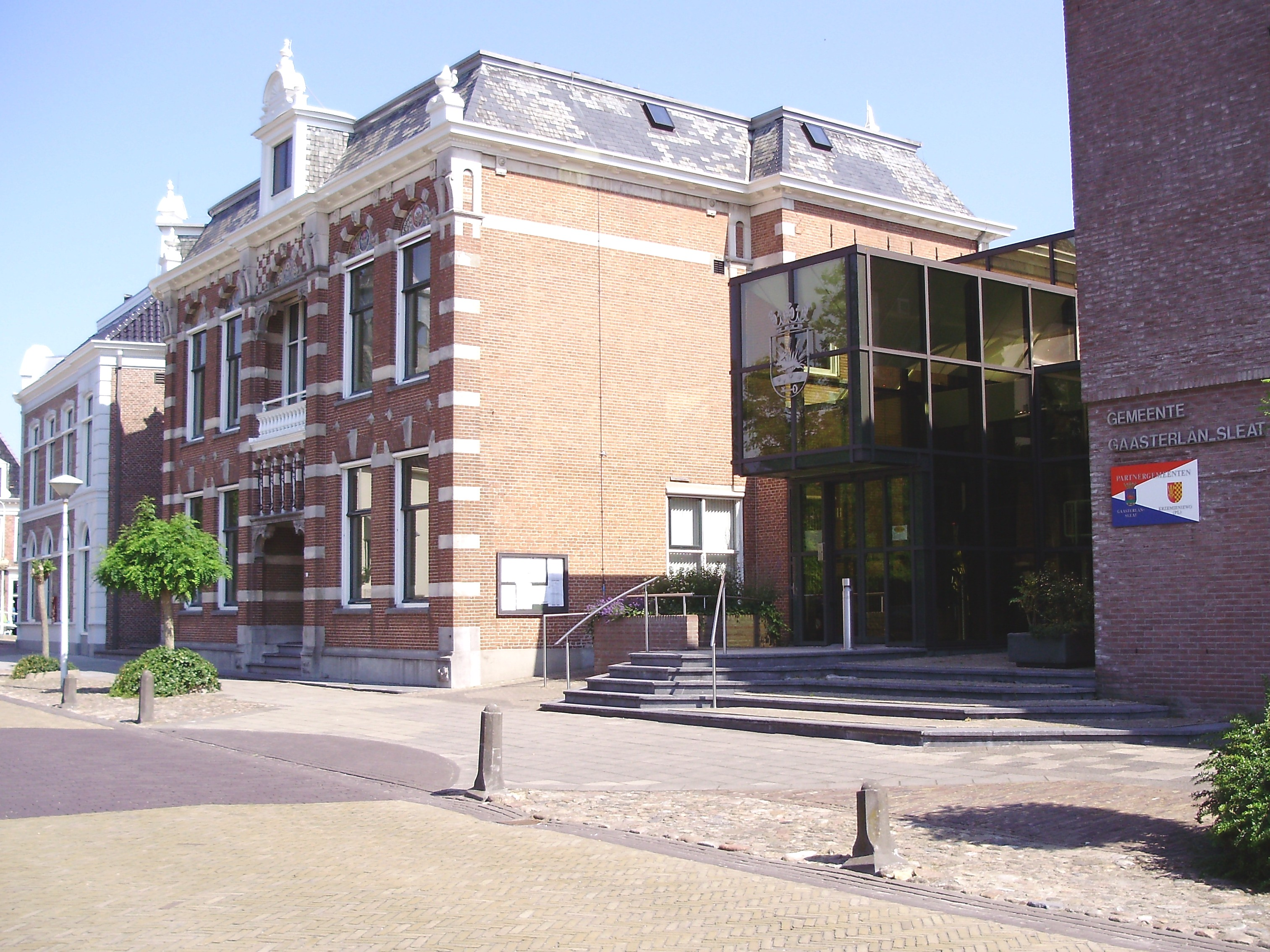 Gemeentehuis van Gaasterlân-Sleat in Balk (provincie Friesland, Nederland)